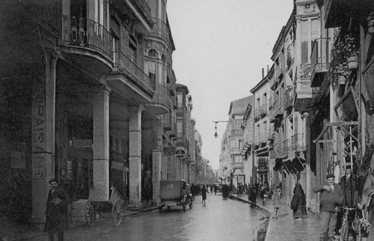 Calle Mayor - Palencia - L. Roisin. fot. Barcelona - Postal 140 x 90 B/N